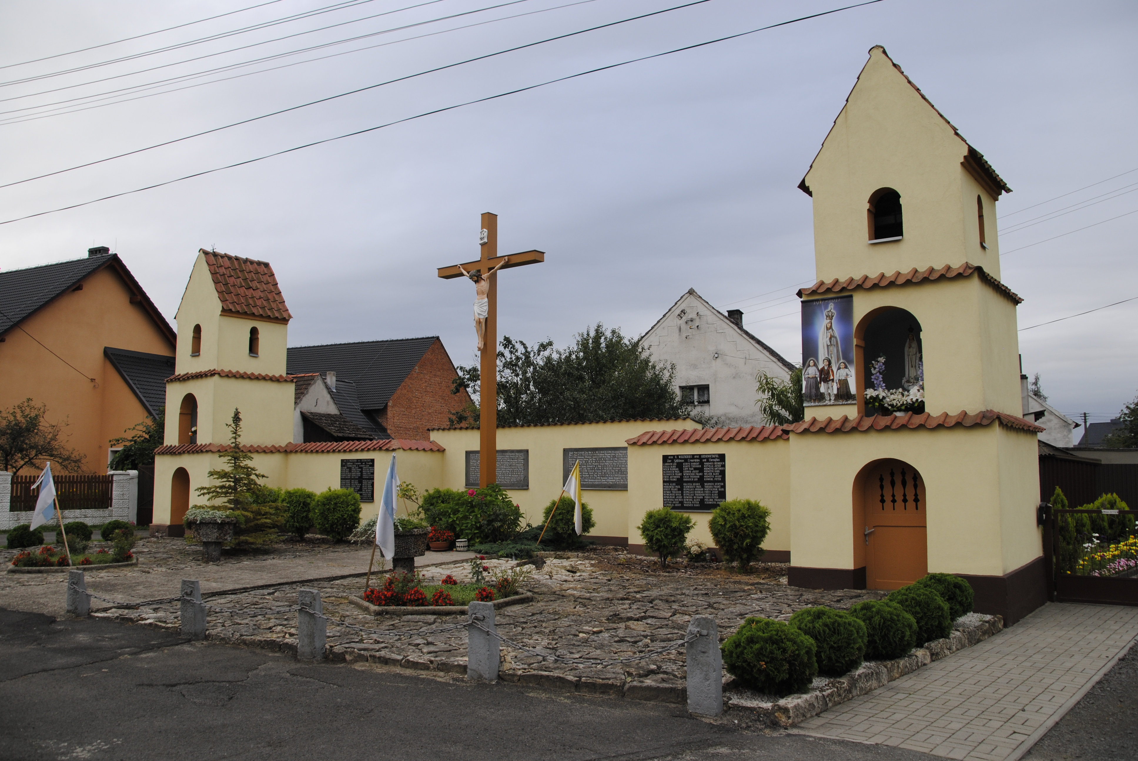 Wegekapellen und Kriegerdenkmal in Węgry (Turawa) (dt. Wengern)